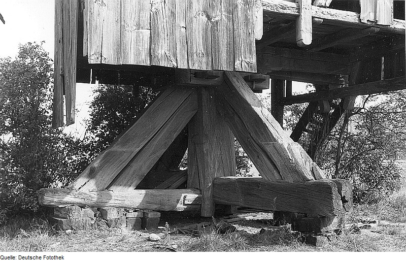 Original image description from the Deutsche Fotothek Mockrehna-Langenreichenbach. Bockmühle bei der ehem. Feldmühle, Detail